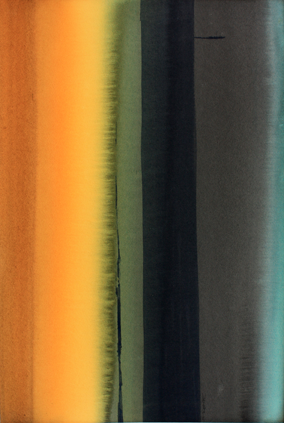 Fra Serien: Skog 2017 Akvarell 56 x 36